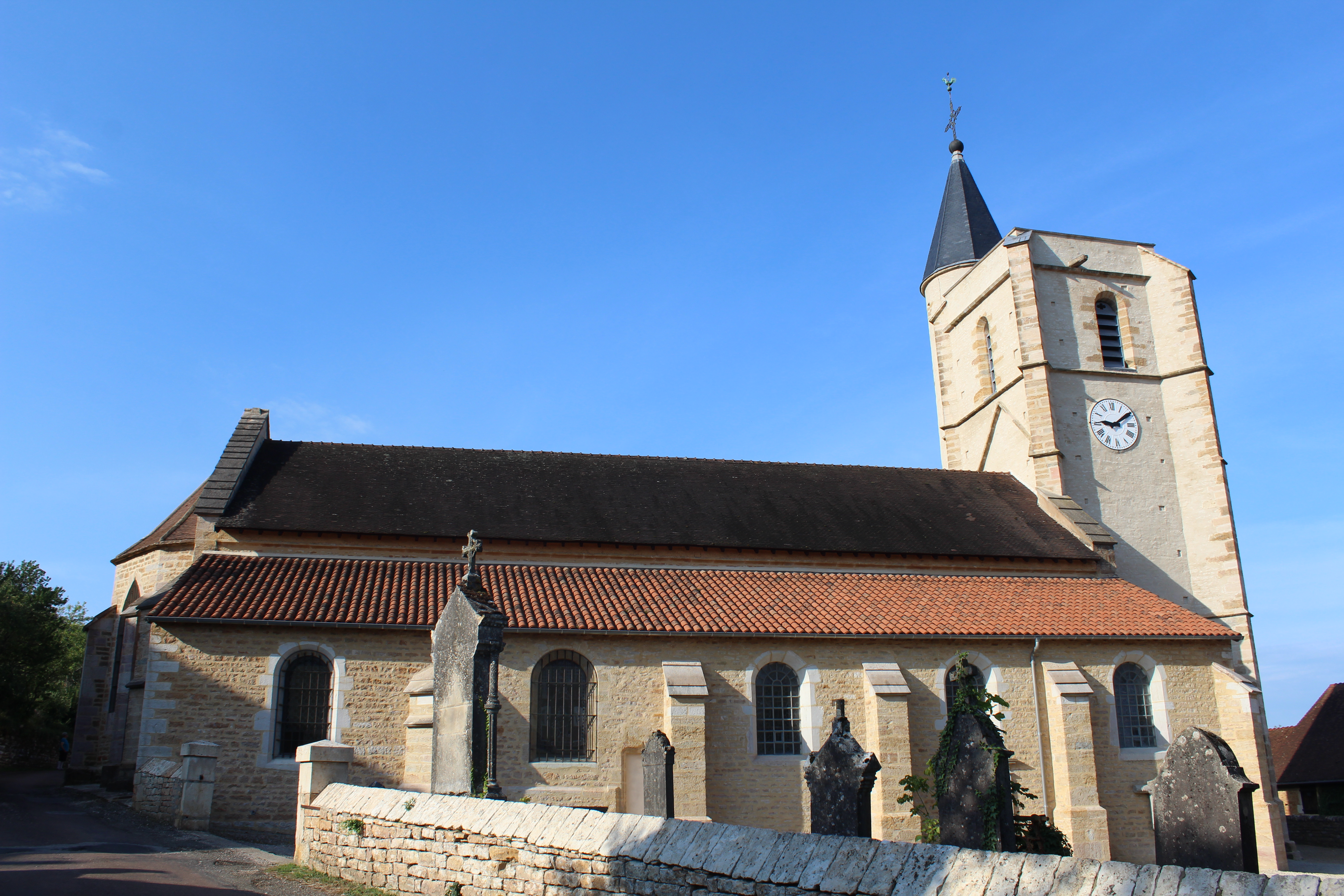 Église Saint-Cloud de Maynal.